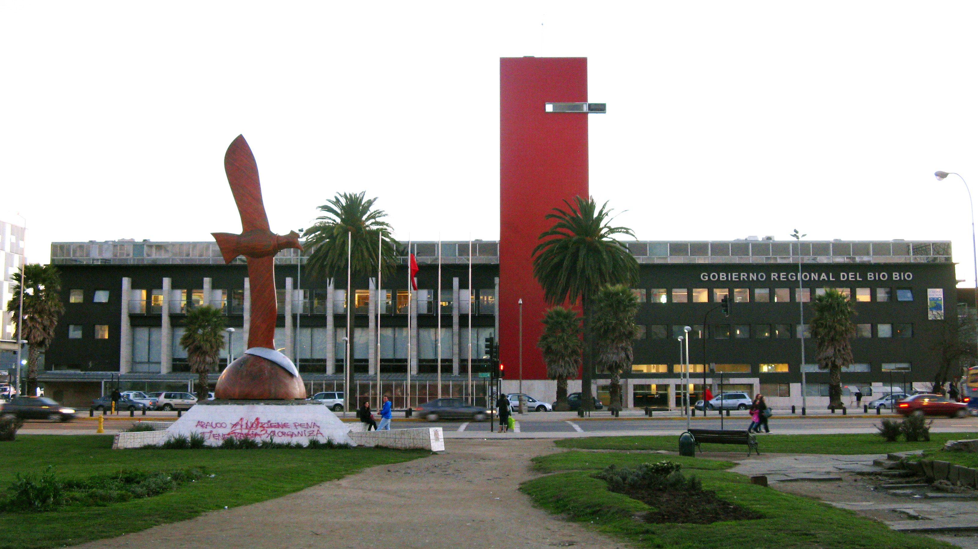 Gobierno Regional del Biobío (GoRe Biobío) Centro Cívico de Concepción Concepción, Chile Julio de 2012